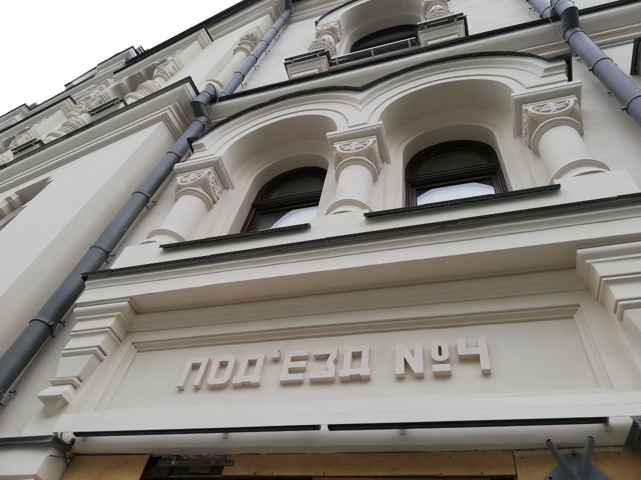 Фасад Политехнического музея со стороны Лубянского проезда